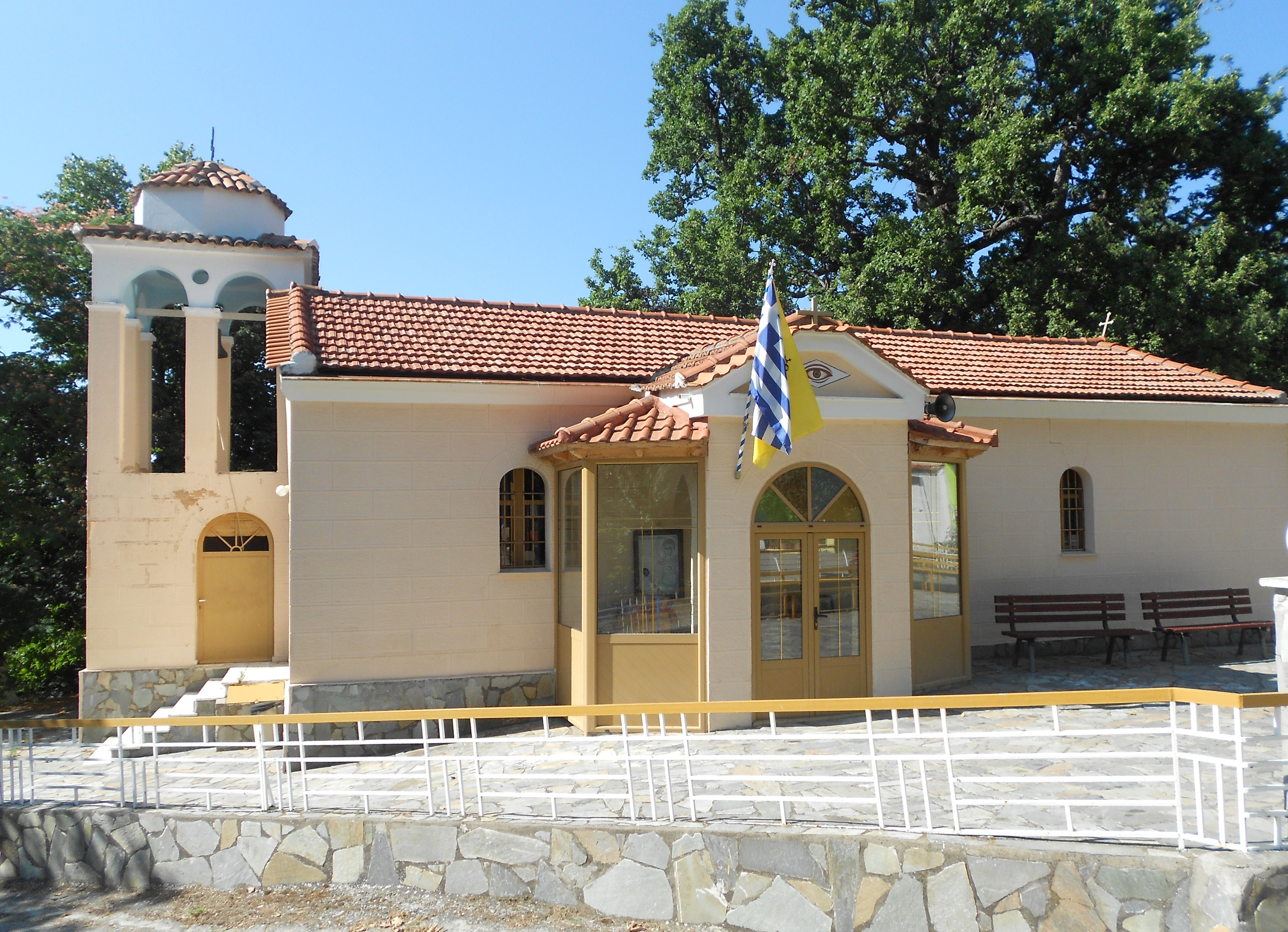 Εκκλησία σε ορεινό χωριό της Βόρειας Εύβοιας